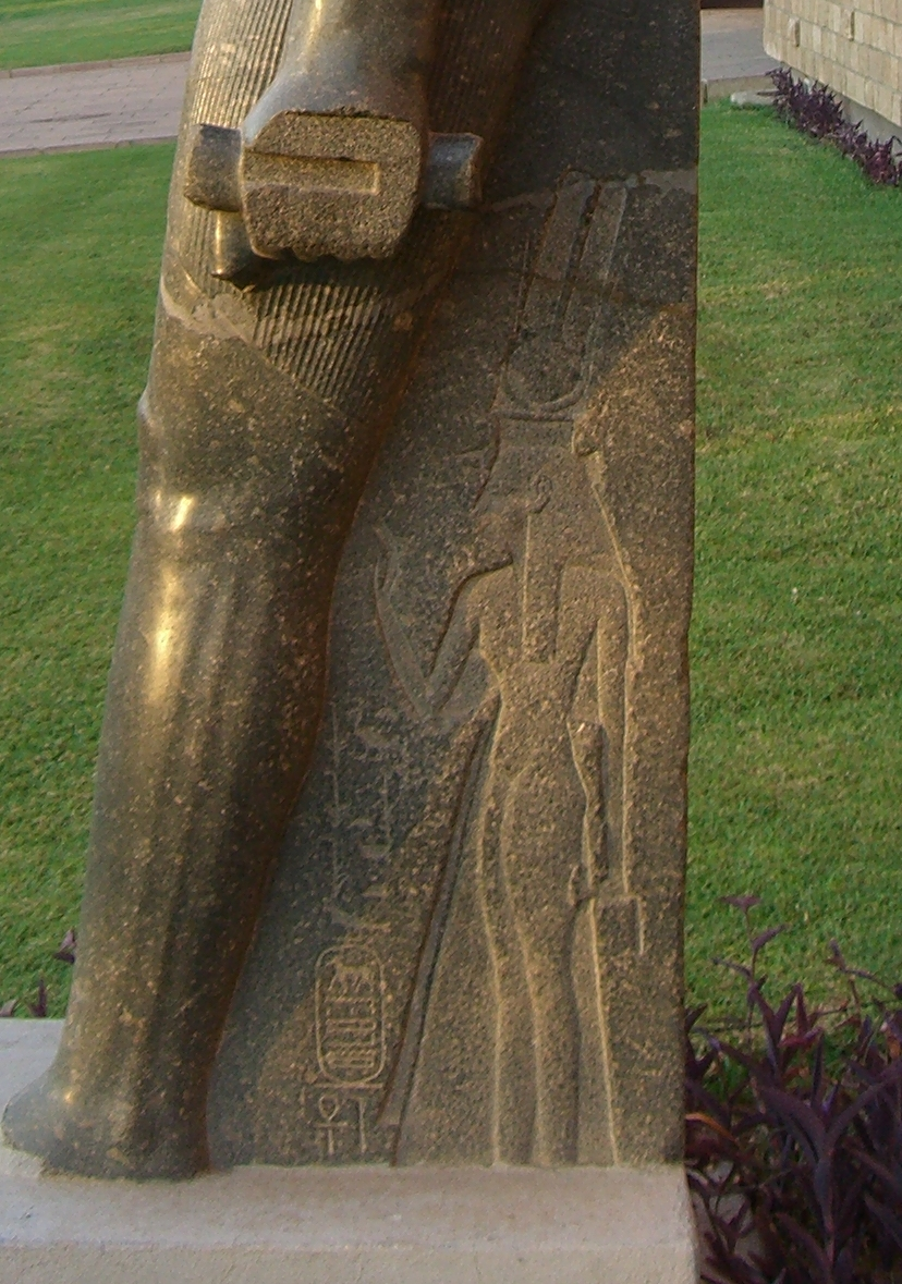 Relief représentant Bentanat II, fille de Ramsès II et de Bentanat Ire - Jardin du Musée de Louxor - XIXe dynastie égyptienne